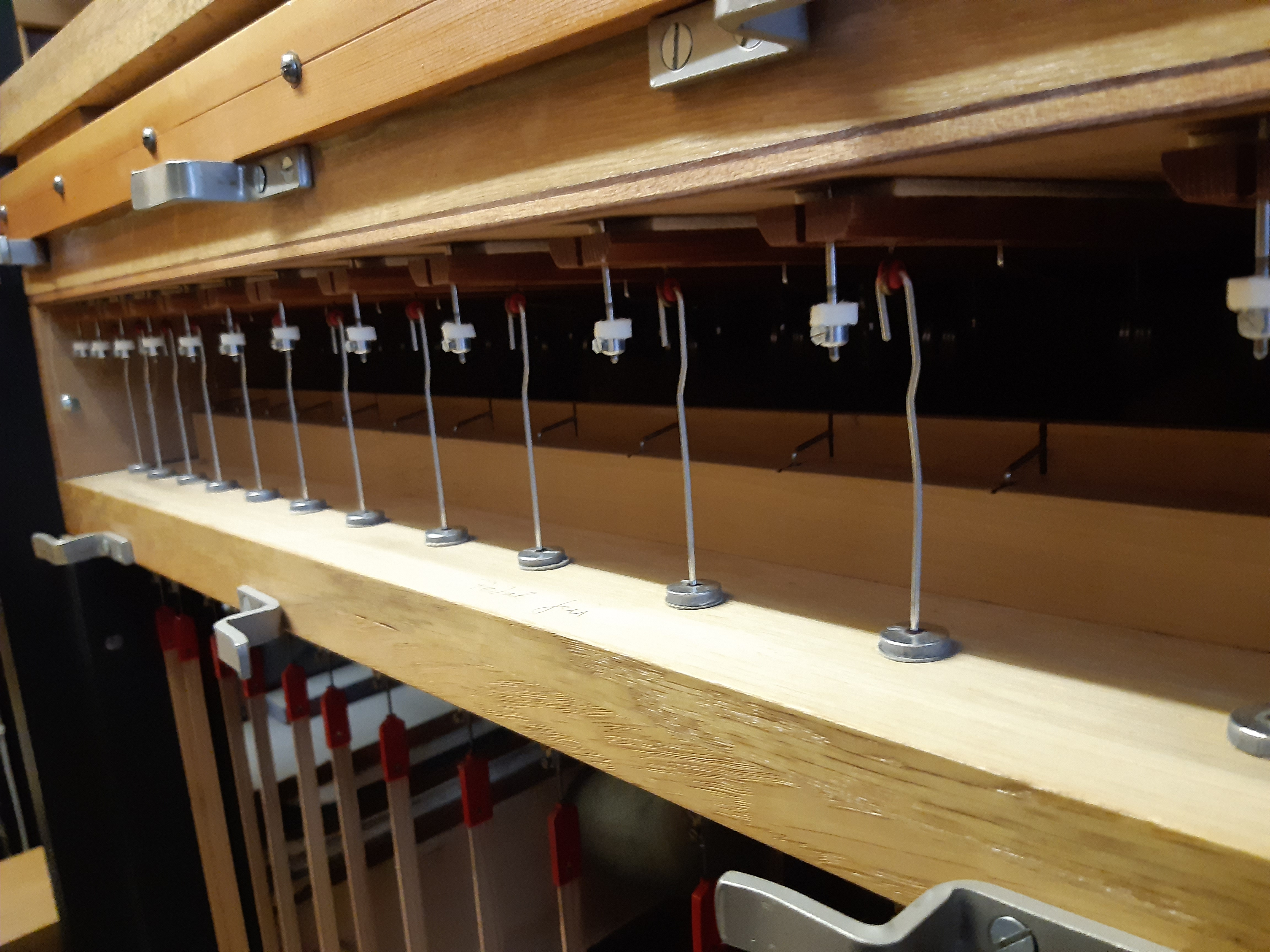 Ein Teil der Windlade des Pedalwerks.